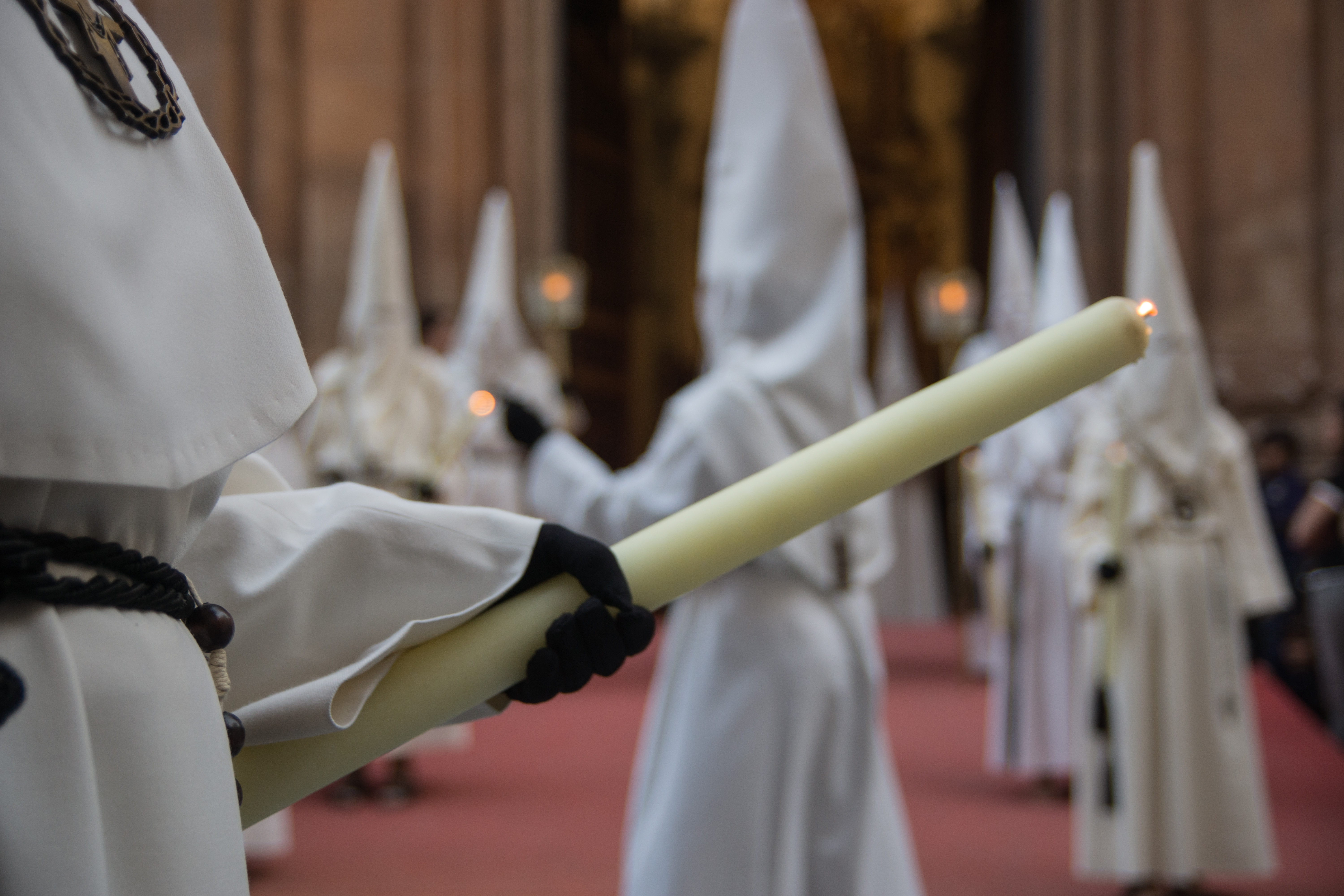 Cofradía del Yacente. Nazarenos saliendo de San Juan de Dios. This is a photography of a Folklore festival in Spain (Wikidata id Q5685566).